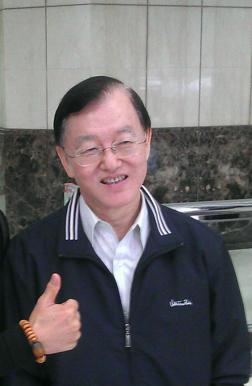 資深媒體人盛竹如。